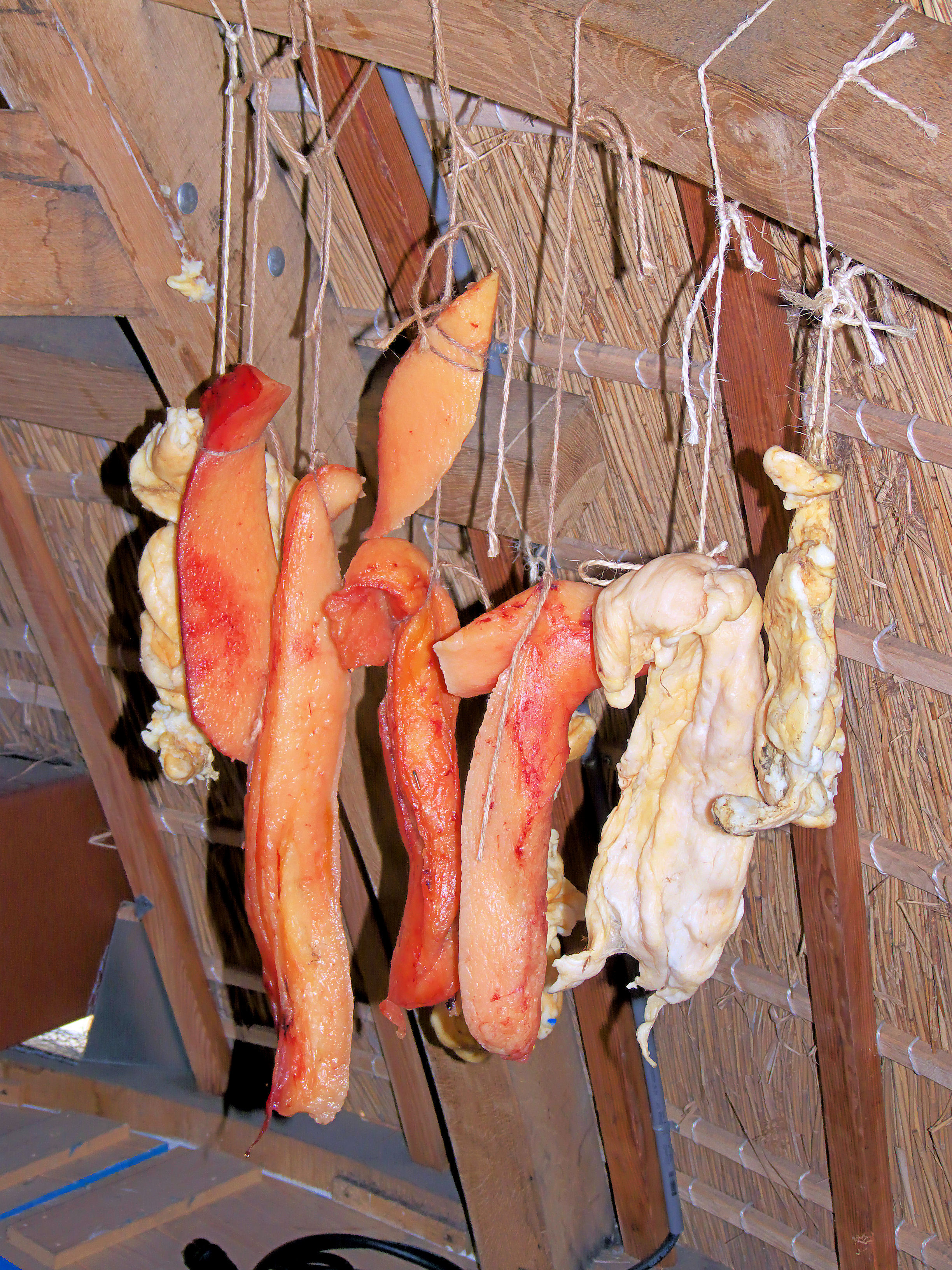 Molen De Hoop, Bunschoten, the Netherlands, rechts 3 en links 1 reuzelvellen; in het midden paardenvet